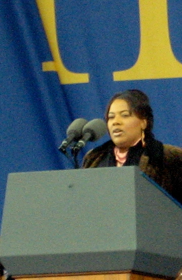 A preacher, indeed. Dexter King didn't make it.